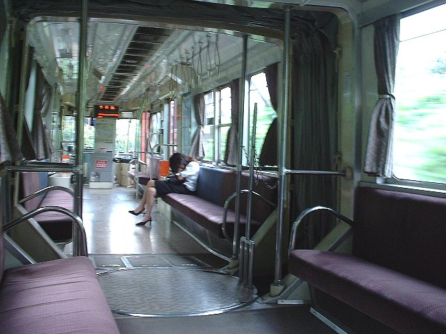 名鉄モ870形電車車内 手前が連接部